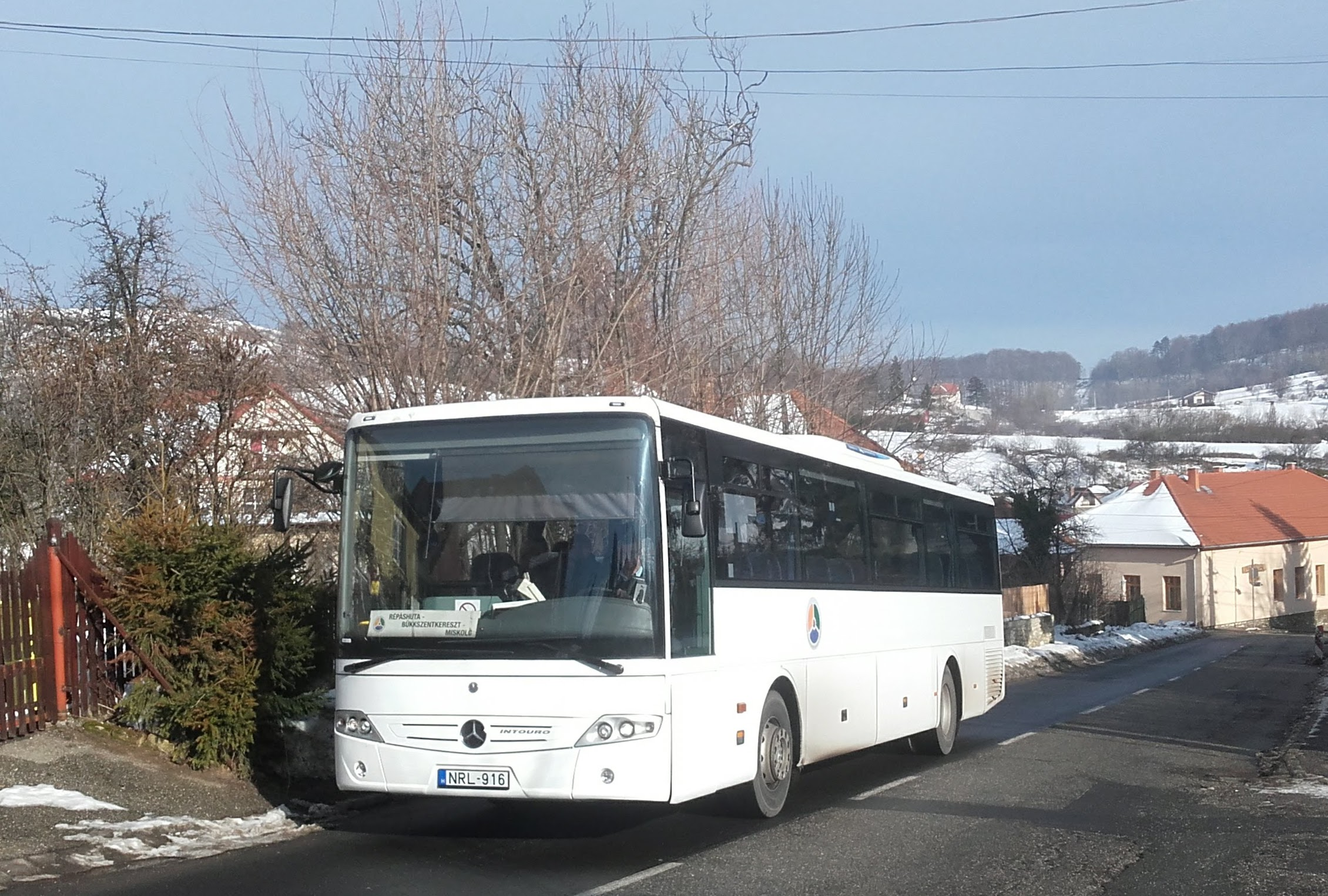 Az ÉMKK NRL-916 rendszámú Mercedes Intouro busza Bükkszentkereszten, a 3755-ös helyközi járaton.